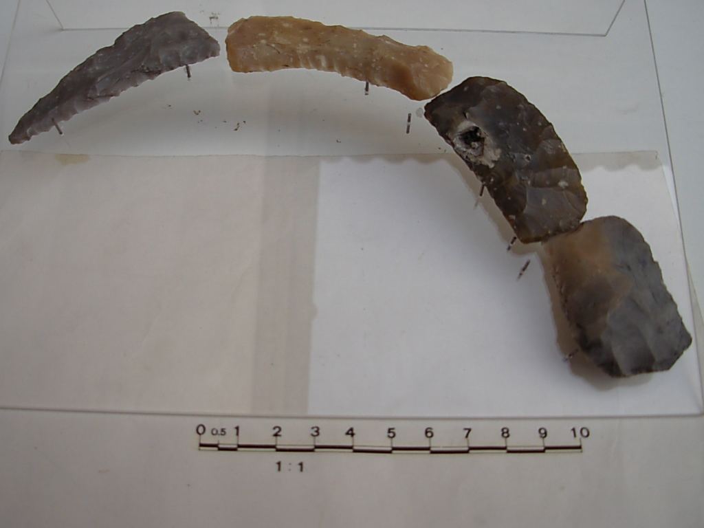 Falcetto da Ca’ Magre (Trevenzuolo)